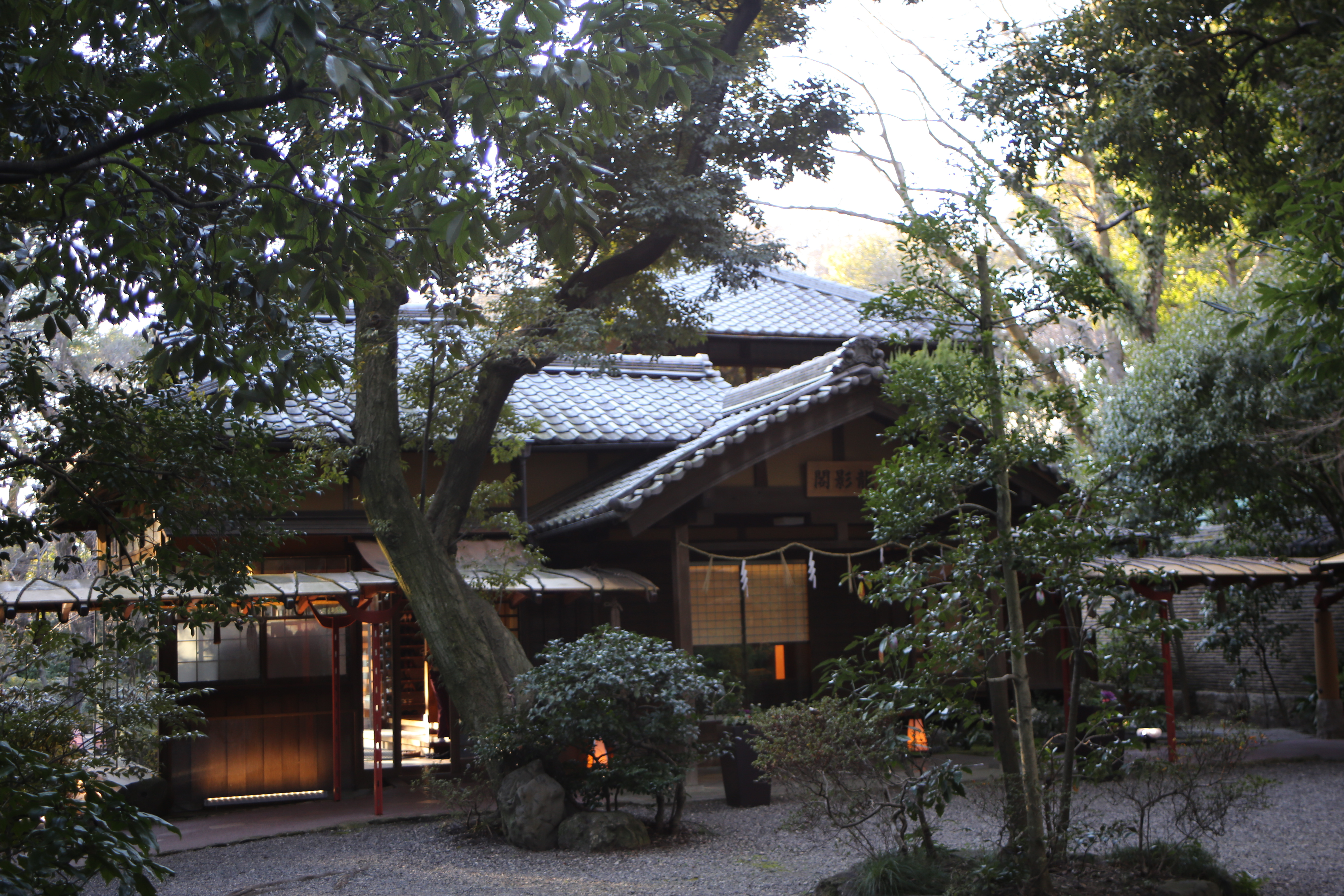 名古屋市熱田区の熱田神宮境内に移設および保存されている龍影閣